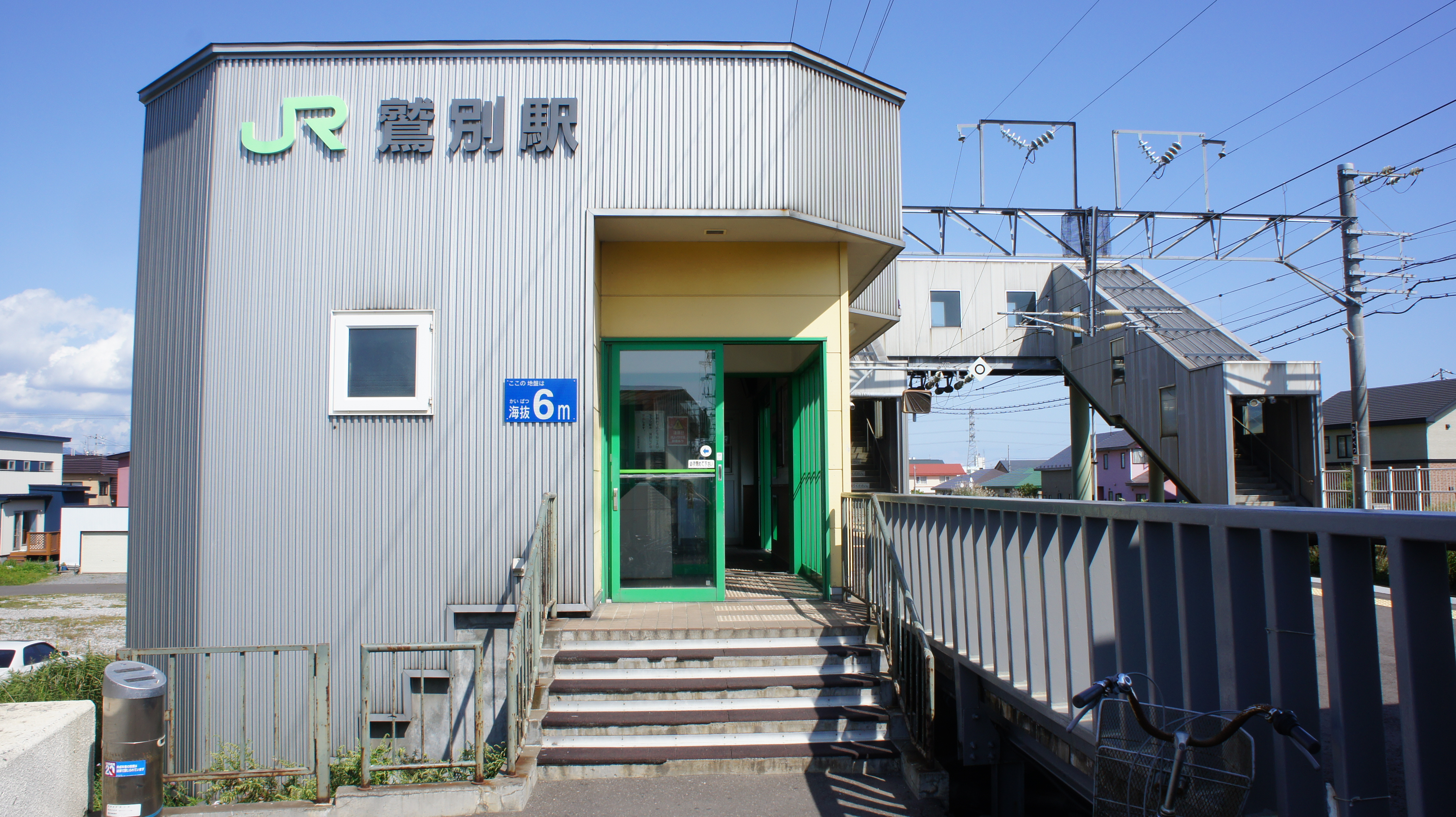 JR室蘭本線・鷲別駅の駅舎